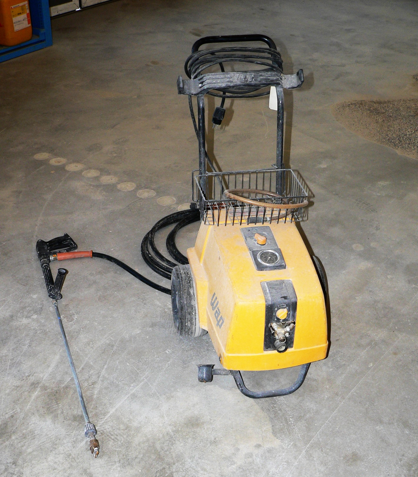 kärcher